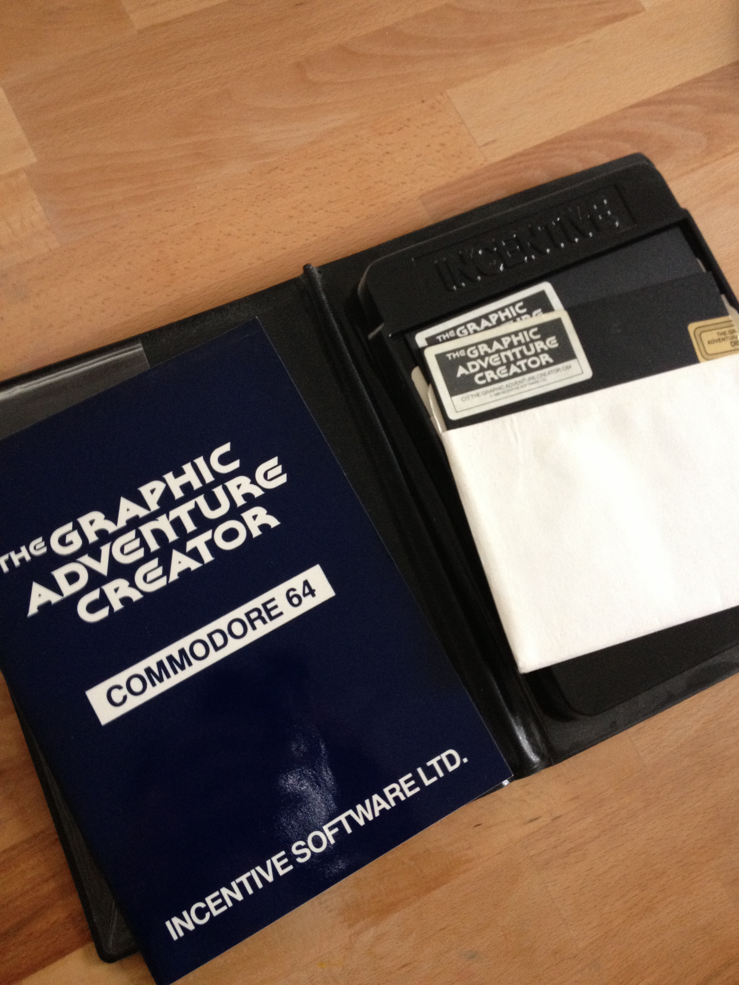 Packung der C64 Software Graphic Adventure Creator